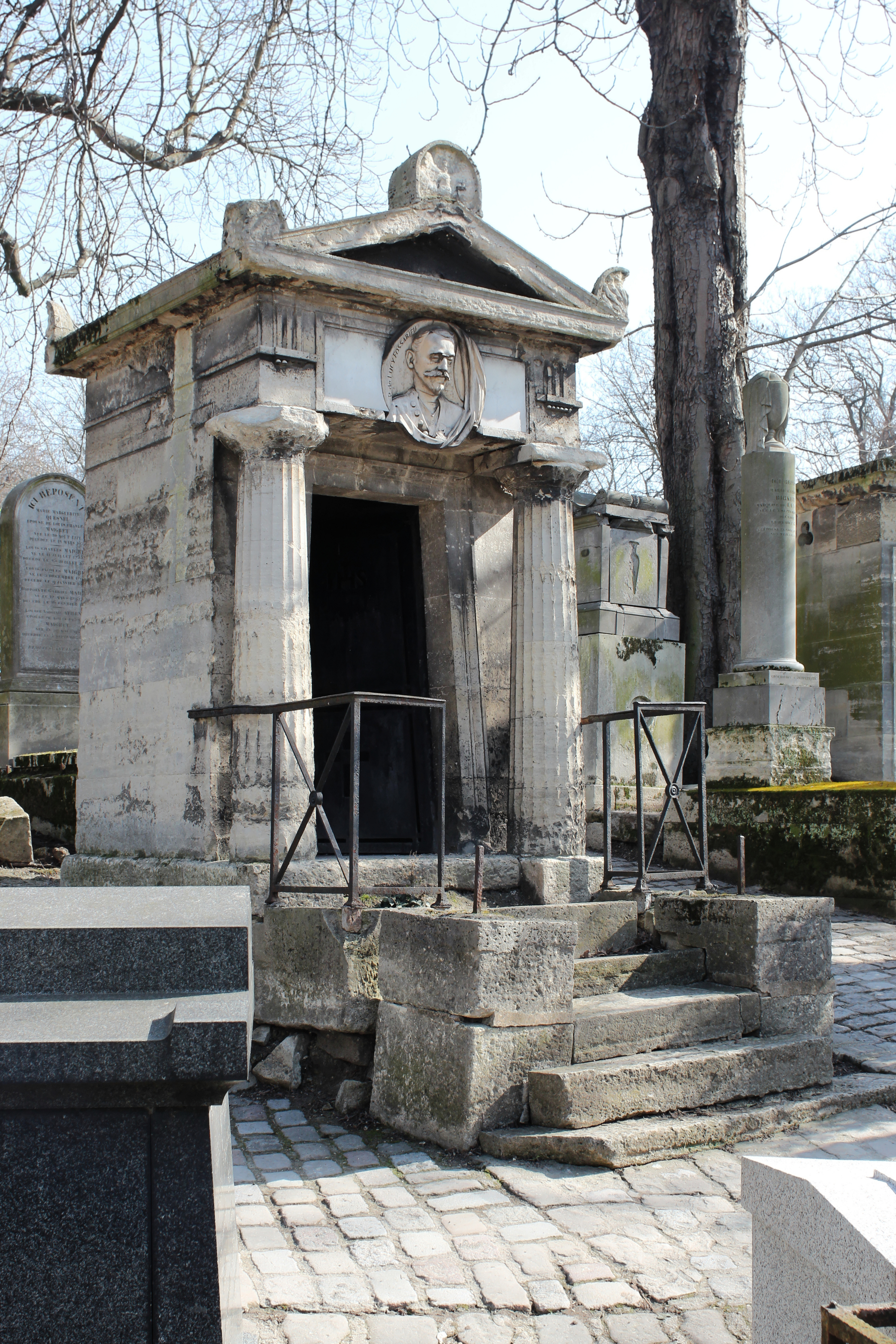 Chapelle néo-antique en forme de temple romain distyle à colonnes doriques grecques et acrotères à palmettes. Médaillon représentant P. de Lucy Fossarieu au linteau, dans la hauteur de l'architrave et la frise, en bésicles.